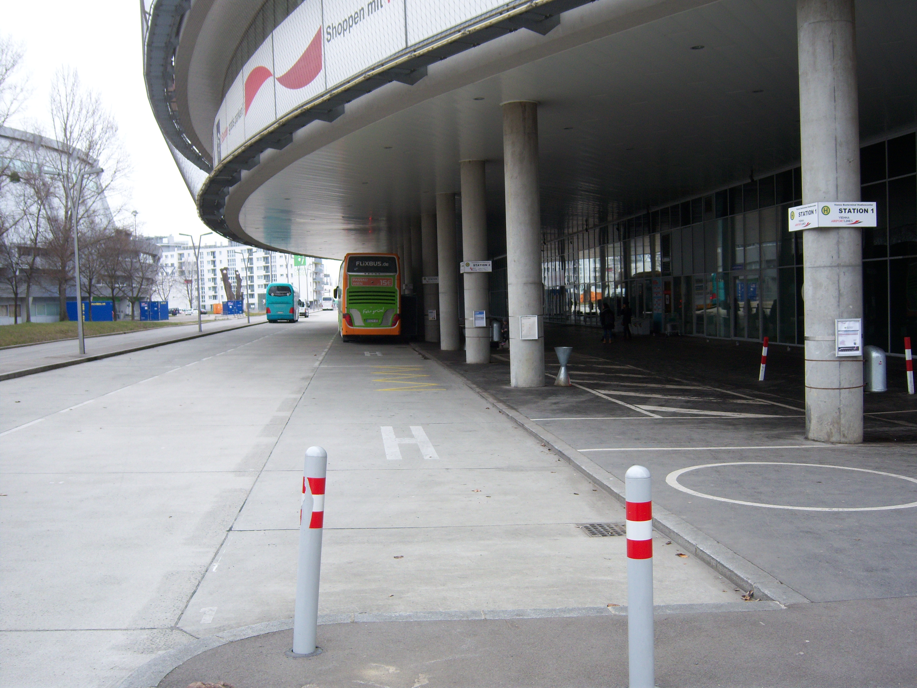 Busterminal Wien Station Center (ZOB)